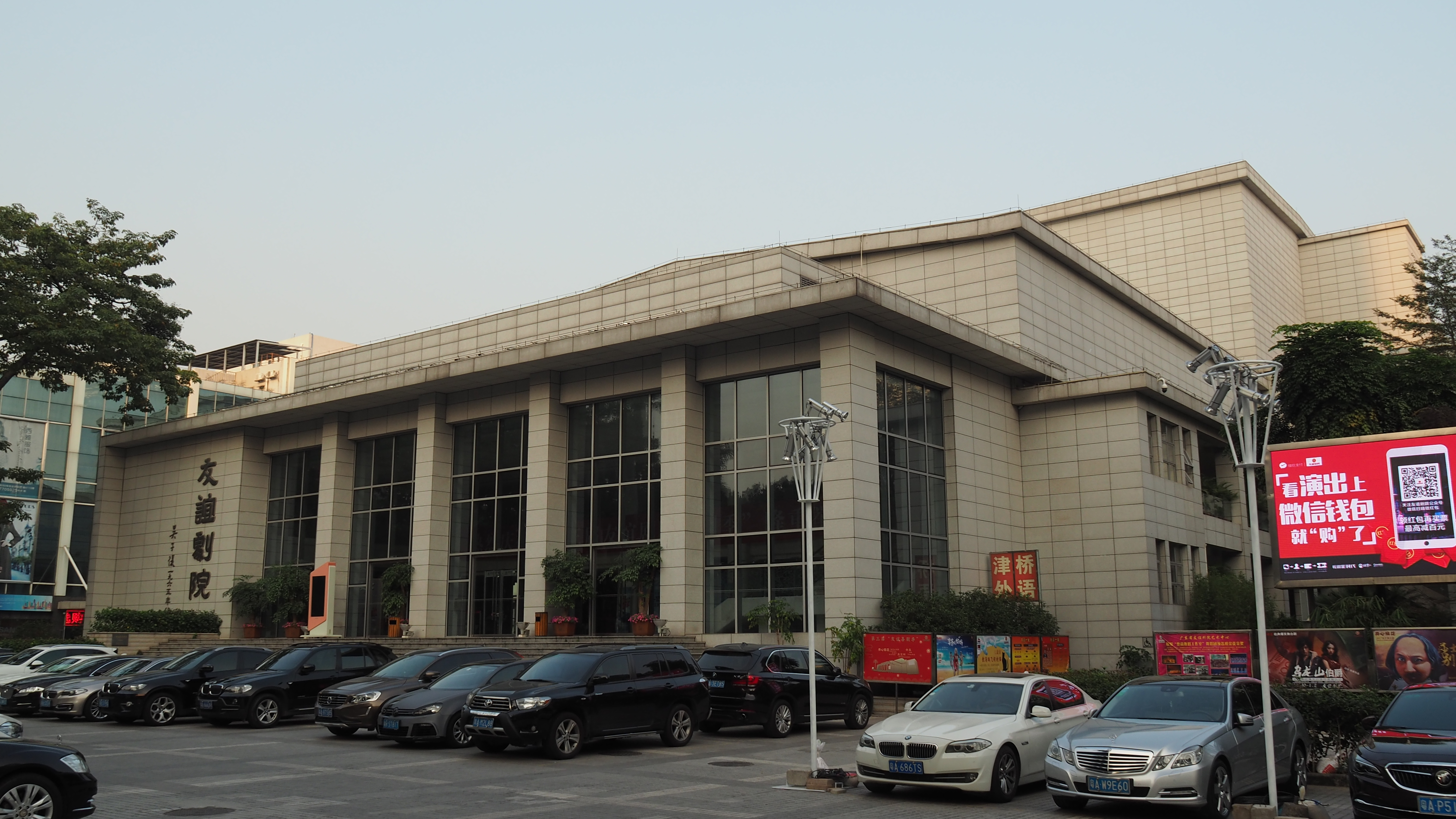 中文（中国大陆）: 位于广东省广州市越秀区人民北路696号。